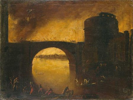 Construction d’un pont et Bataille sur un pont (2 toiles)